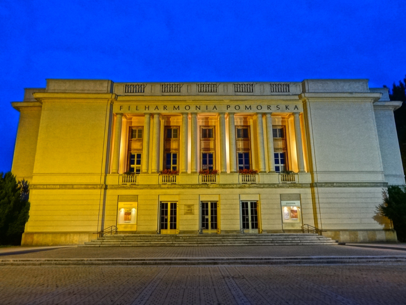 Budynek Filharmonii Pomorskiej im. Ignacego Jana Paderewskiego w Bydgoszczy, zbud. w 1955 r.